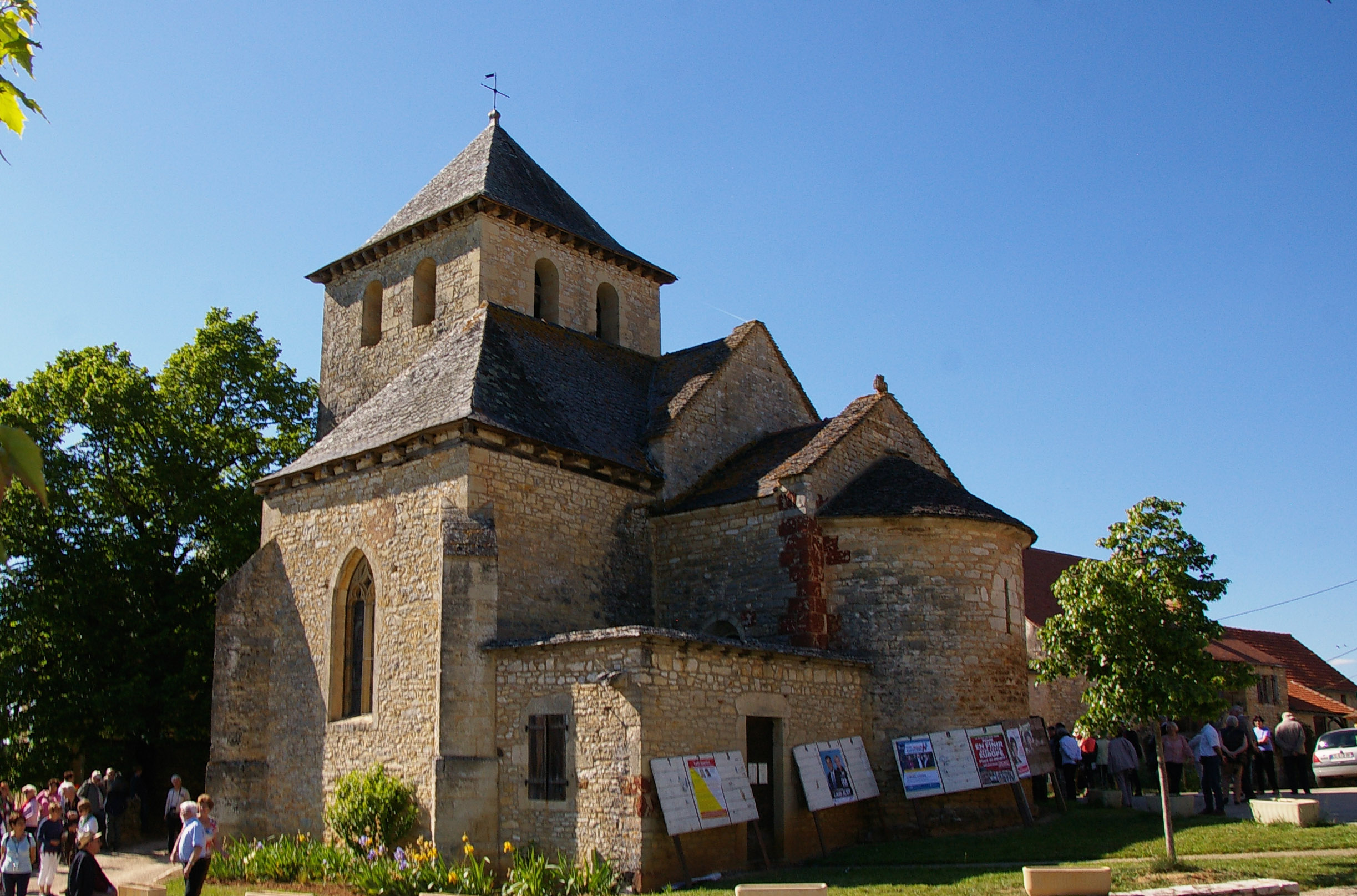 Église Saint-Pierre de Rampoux